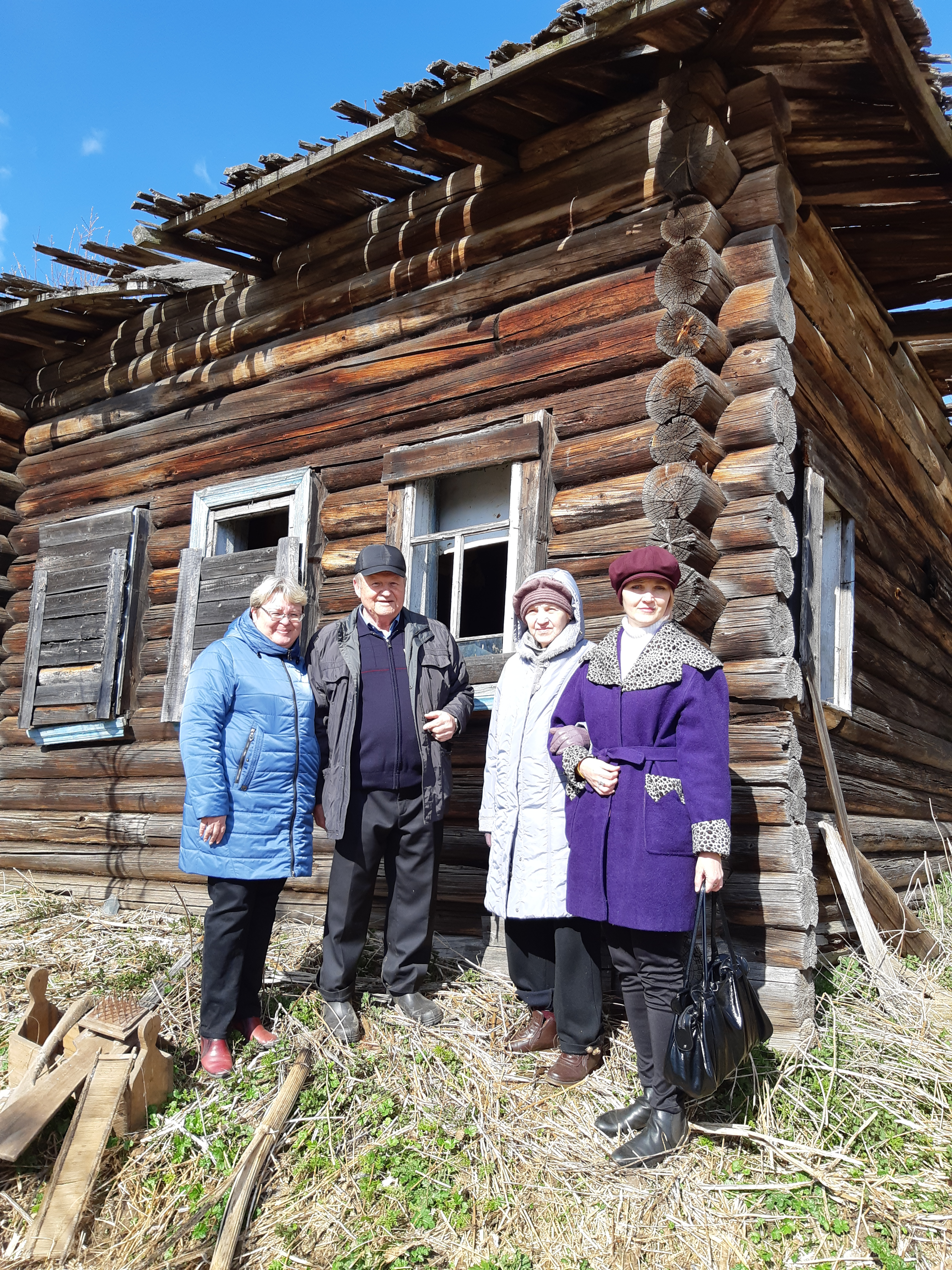 Лызгач. Дом Героя России Дорофеева А. В. 29.4.19